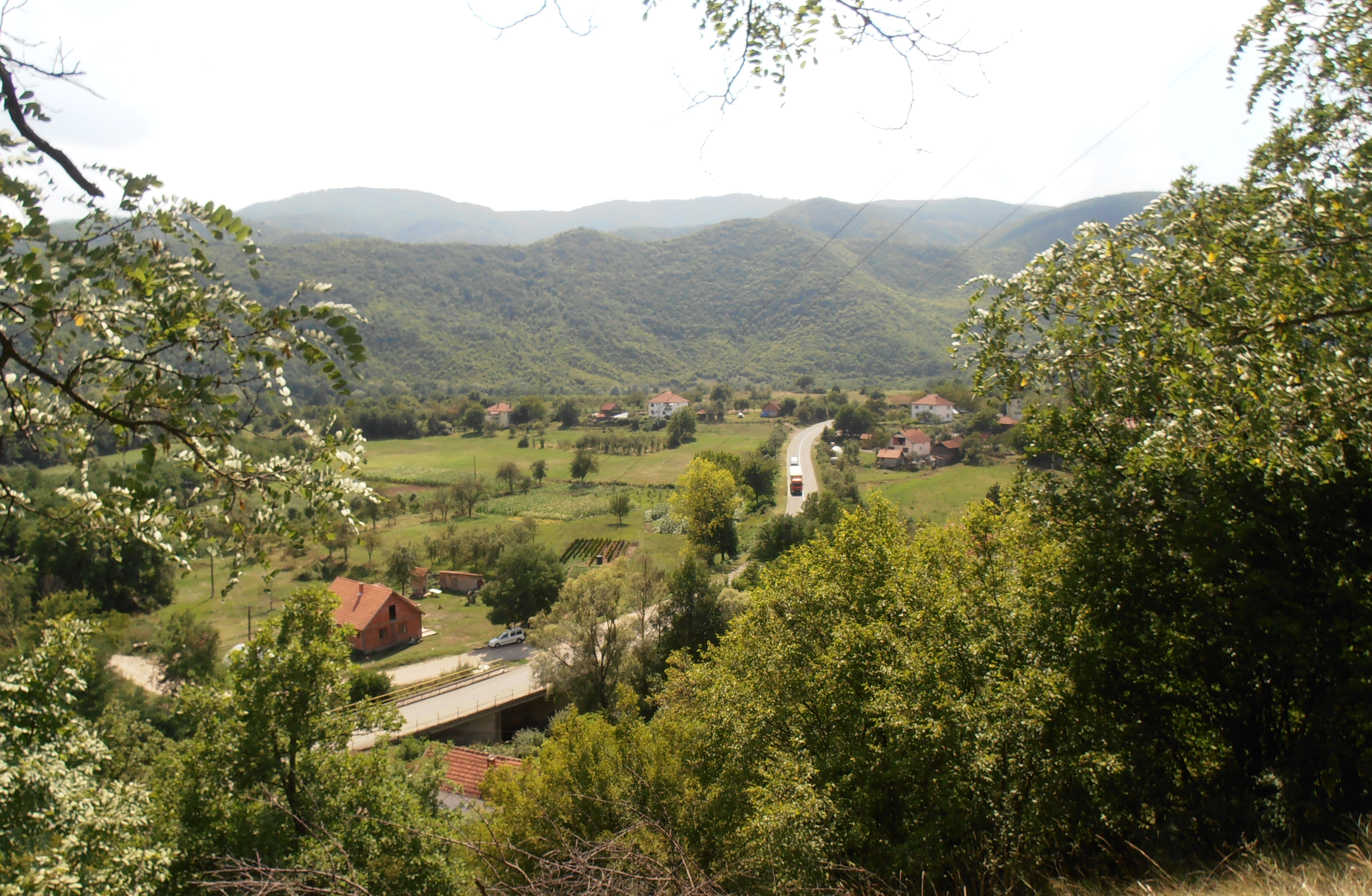 Српски (ћирилица): Дрен (Лепосавић) - поглед на село